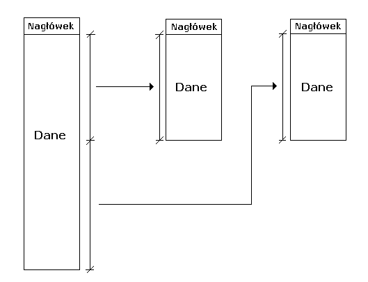 Pokazania podzialu ramki na części odpowiedniej długości